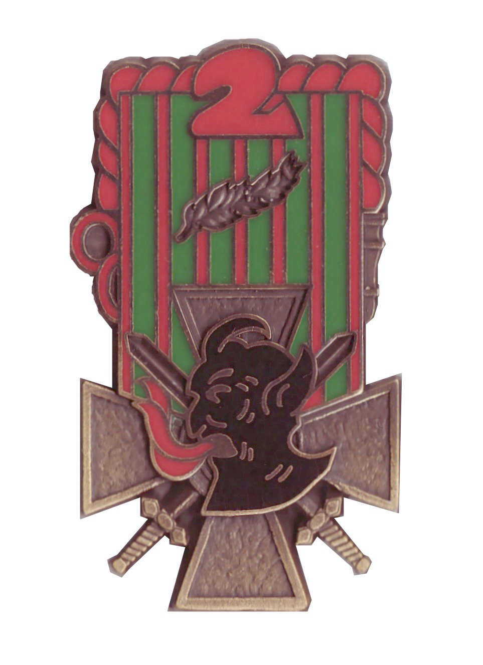 Insigne de la 2e batterie du 61e régiment d'artillerie